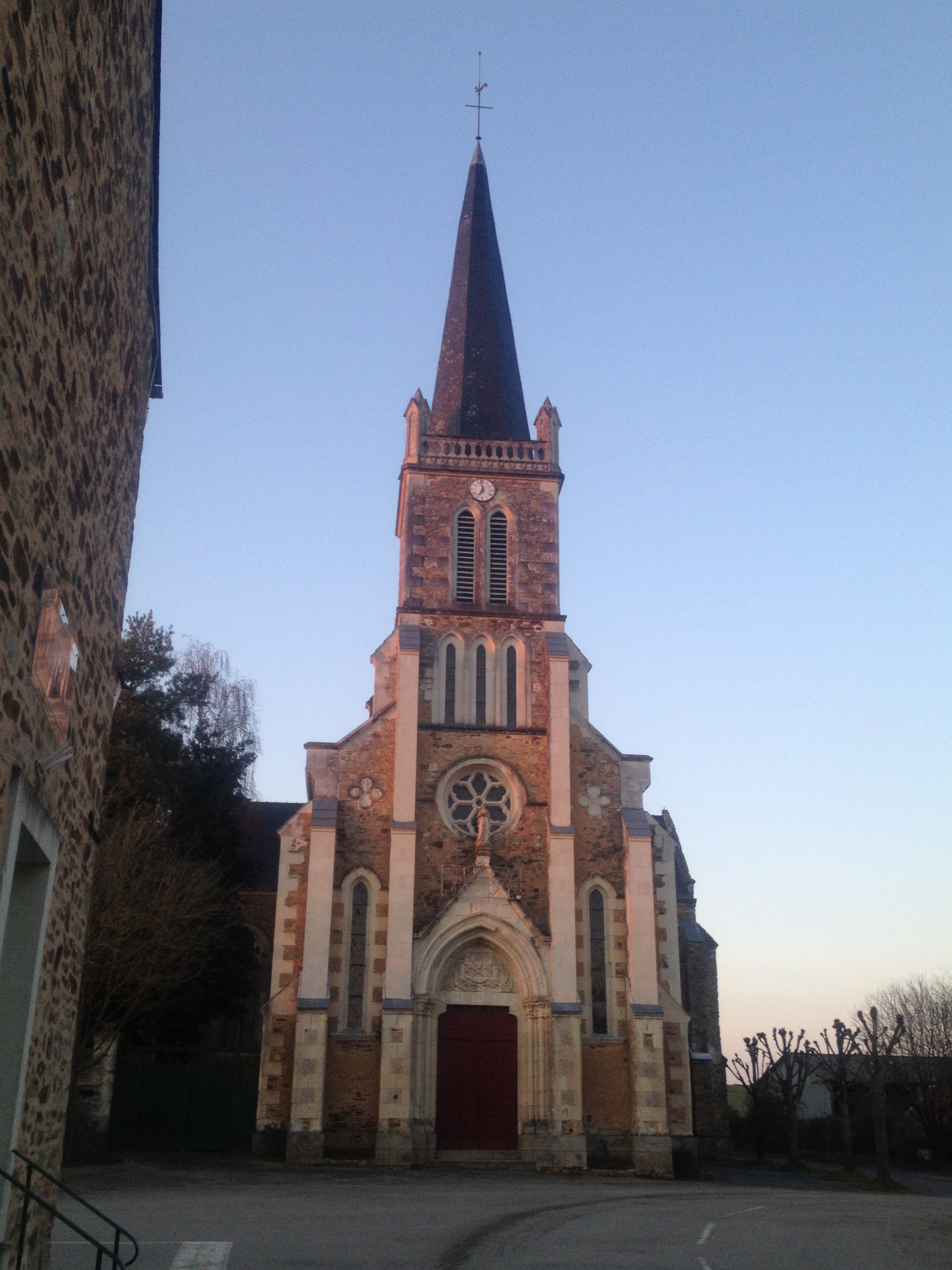 Mayenne, France. Architecte : abbé Dion.